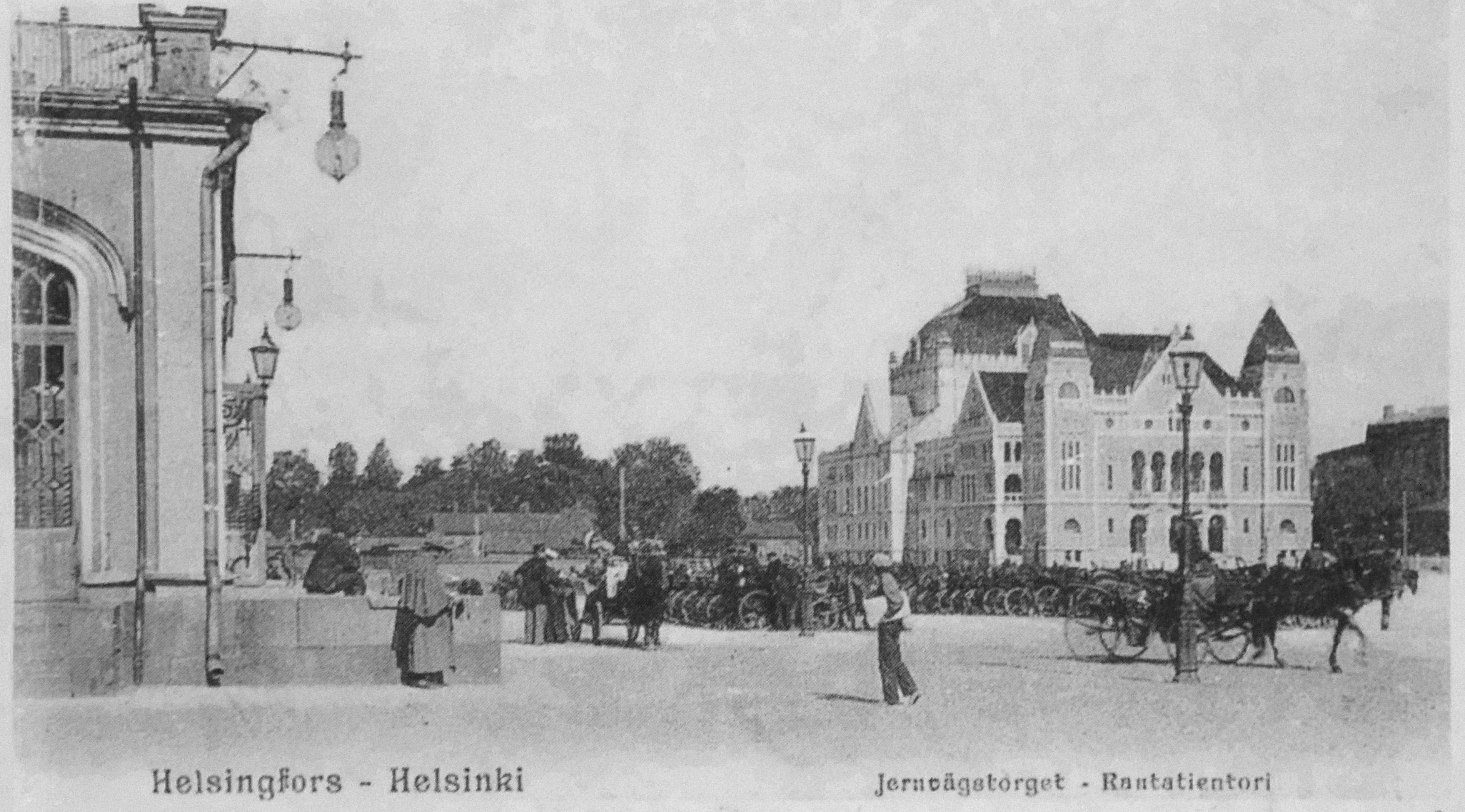 Postikorttikuva Helsingin rautatientorilta vuonna 1906. Vasemmalla laidalla näkyy vanha asemarakennus. Taustalla kansallisteatteri.